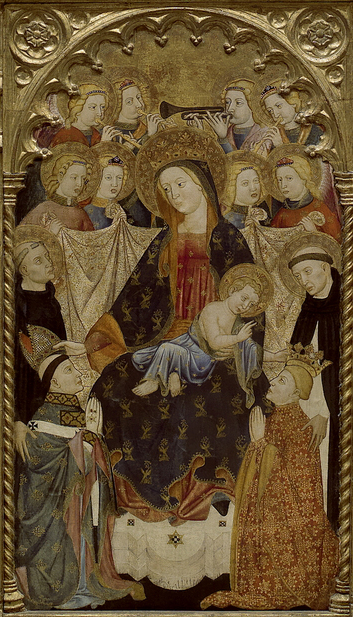 Taula central del retaule de l'arquebisbe de Toledo Sancho de Rojas, procedent de San Benito el Real Valladolid. La Mare de Déu corona d'arquebisbe i el Nen Jesús el rei Ferran d'Antequera